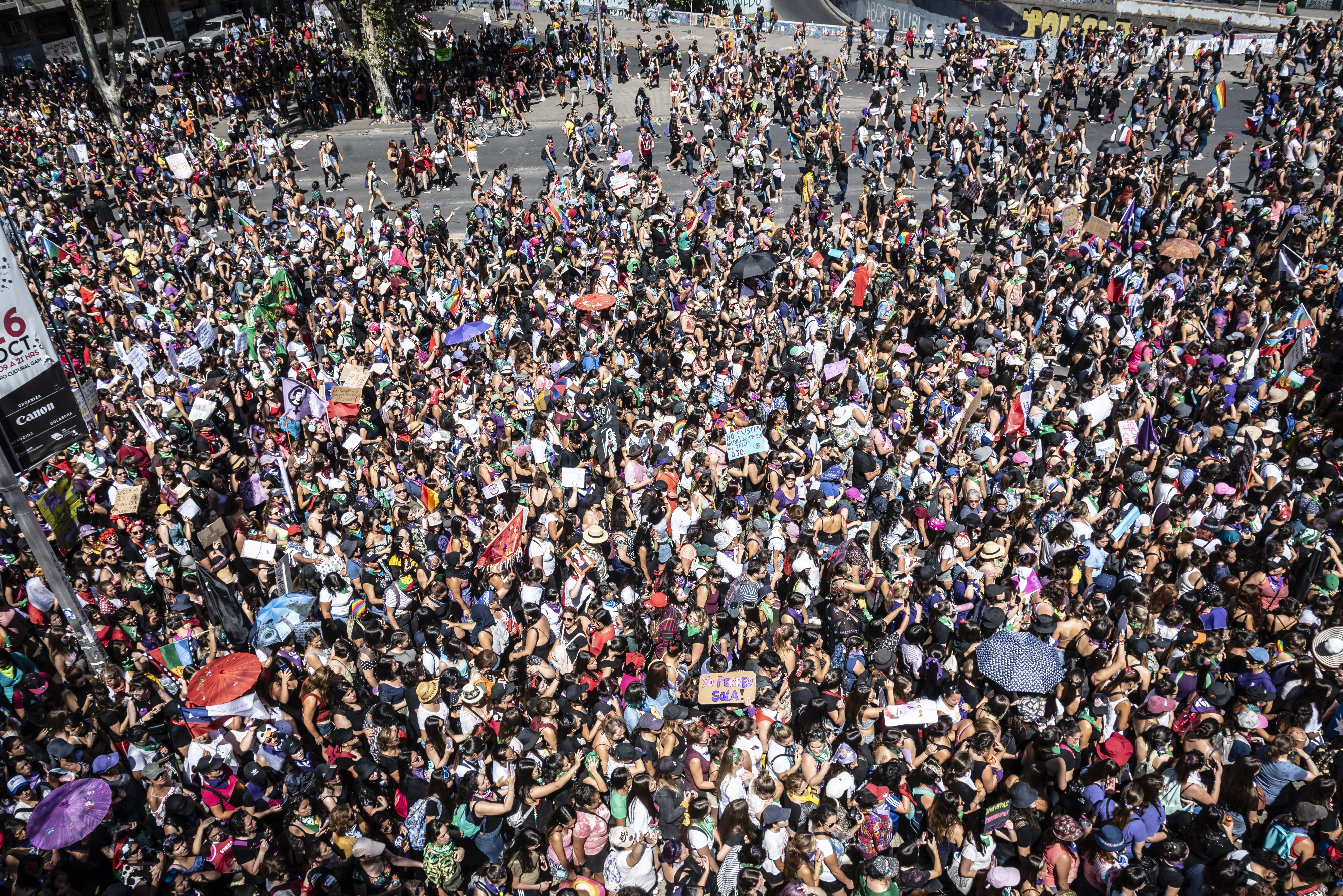 Manifestantes en el día de la mujer desde Cerro Huelén